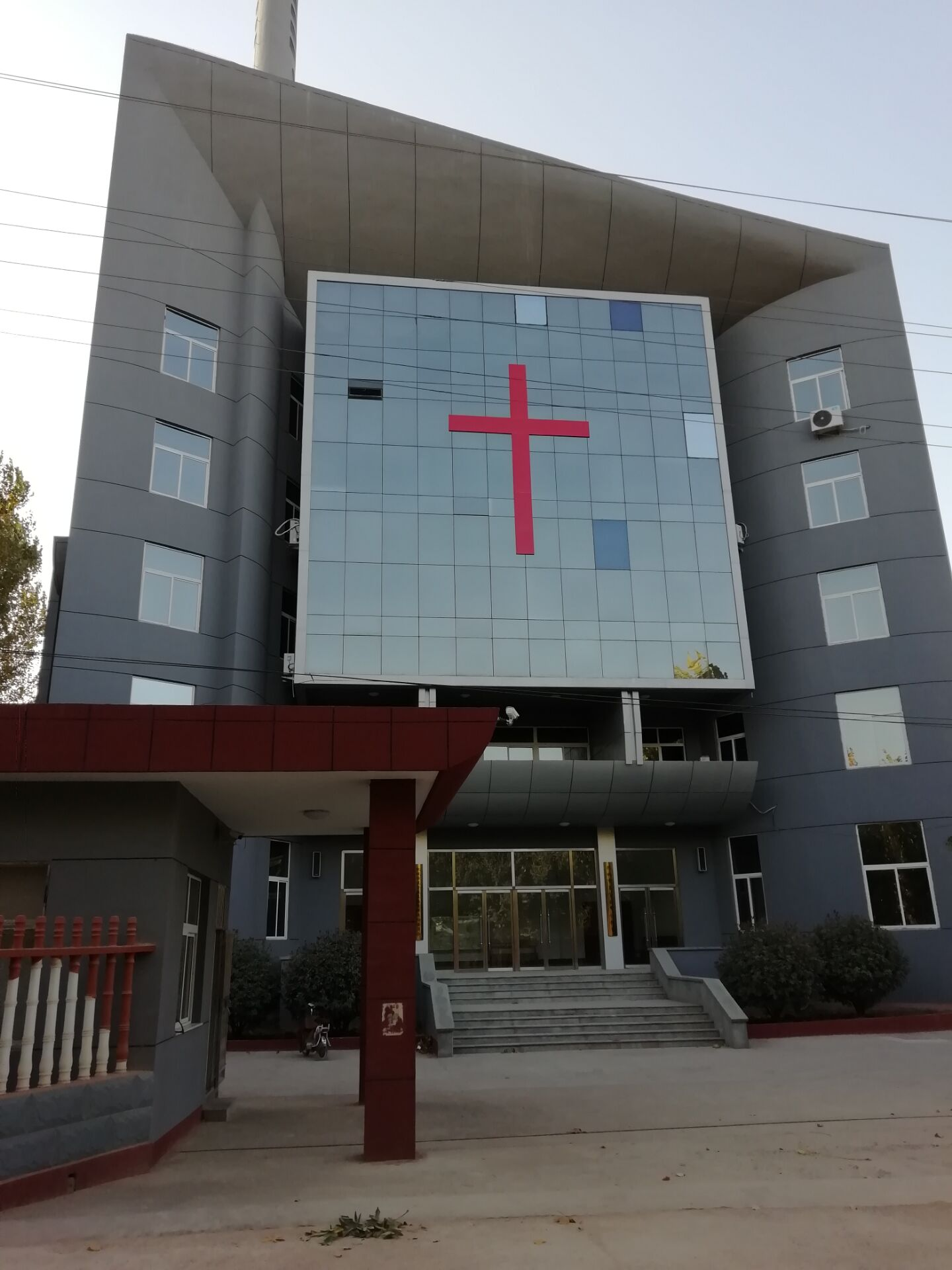 中文（中国大陆）: 肥城市宗教场所